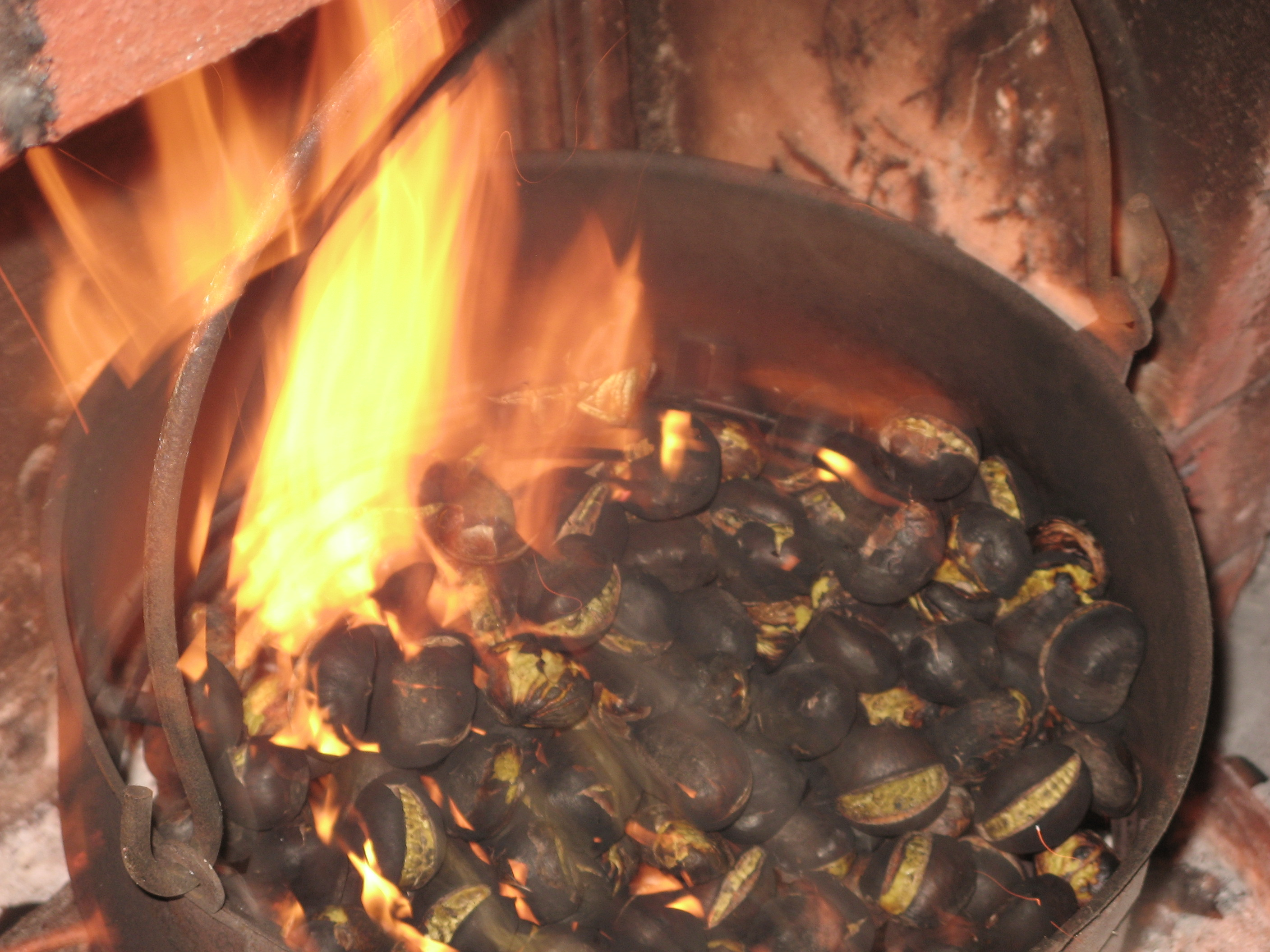 castagnata ad Albavilla, le tradizionali caldarroste o biröll in dialetto locale by Mark alba